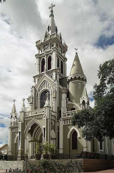 Catedral do Senhor Bom Jesus dos Remédios